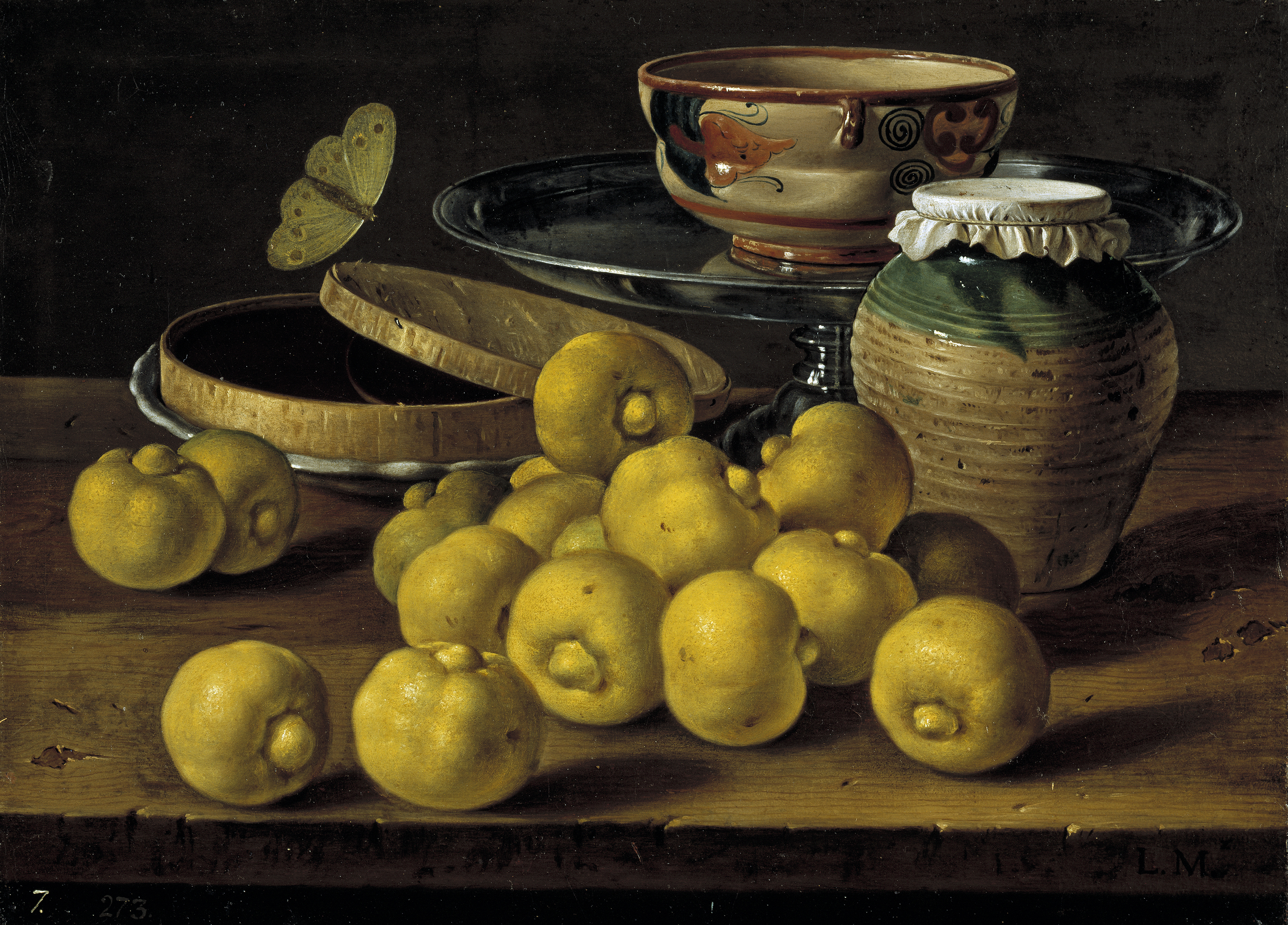 Además de las limas, en primer plano, se ve sobre un plato de loza blanca una caja de dulce entreabierta sobre la que revolotea una mariposa (mezcla de "limonera", gonepteryx rhamni L., y "colia común", colias crocea Geoff). A la derecha, sobre una fuente de peltre, un cuenco vidriado de loza mexicana, del tipo morfológico atamía, con sencilla decoración vegetal y lineal (espirales) típica de la talavera poblana. Delante, a la derecha, una pequeña orza vidriada en su tercio superior o 'babero' y cubierta con un paño y un bramante de cuerda; que por el tamaño y el hecho de estar tapada, probablemente contiene miel para endulzar la compota de limas. La ficha del Museo del Prado hace una descripción diferente: En primer término unas limas.., detrás de ellas una orza de miel, con vidriado verde, como las de Biar o Lucena... En último término se dispone una caja de jalea abierta sobre plato de castañuela, y, una salva con pie, de plata o peltre sobre la que descansa una taza de cerámica mejicana de tipo Tonalá. La mariposa que sobrevuela el conjunto, resulta interesante por su rareza.